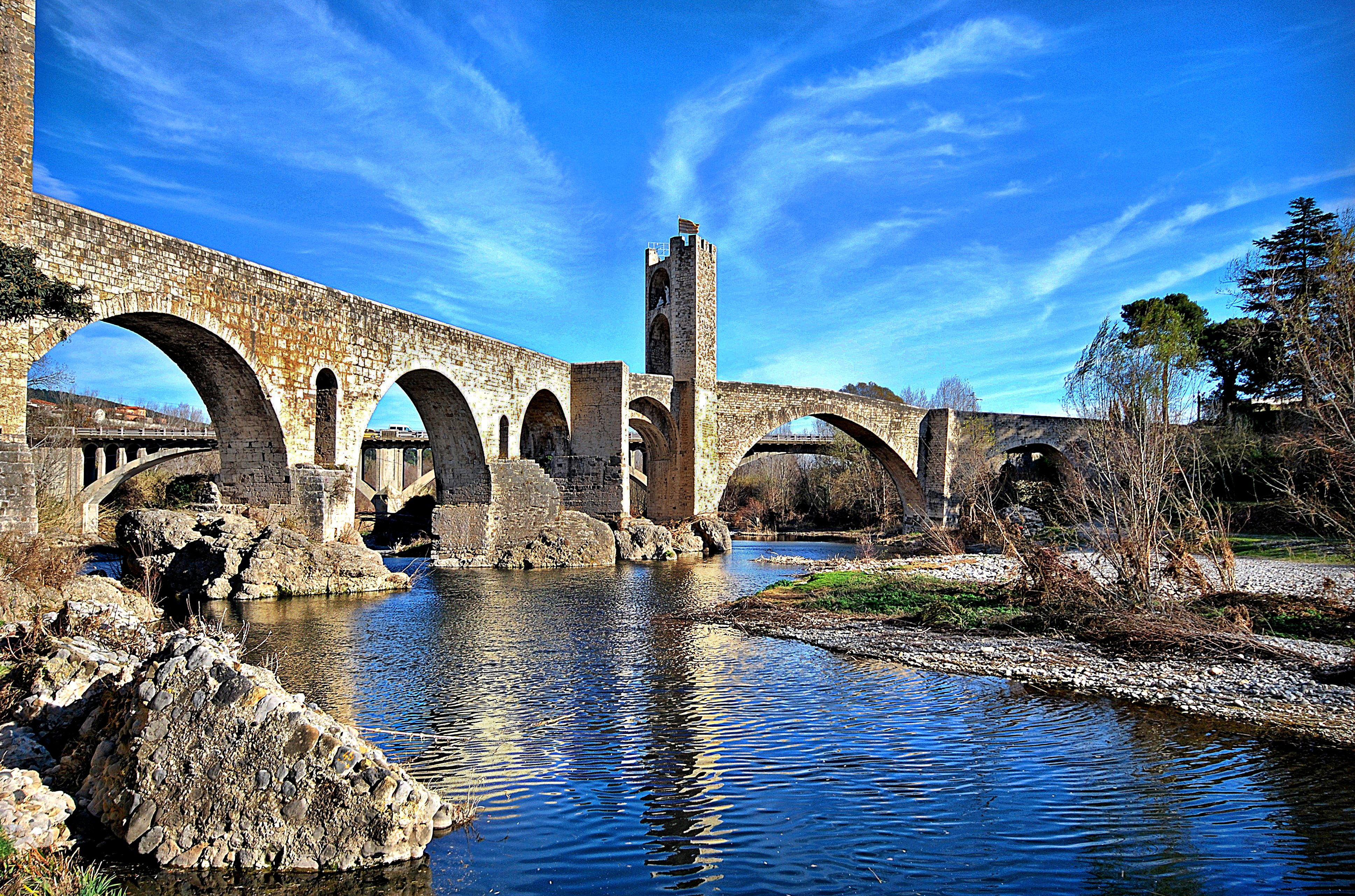 Pont Medieval (Besalú)